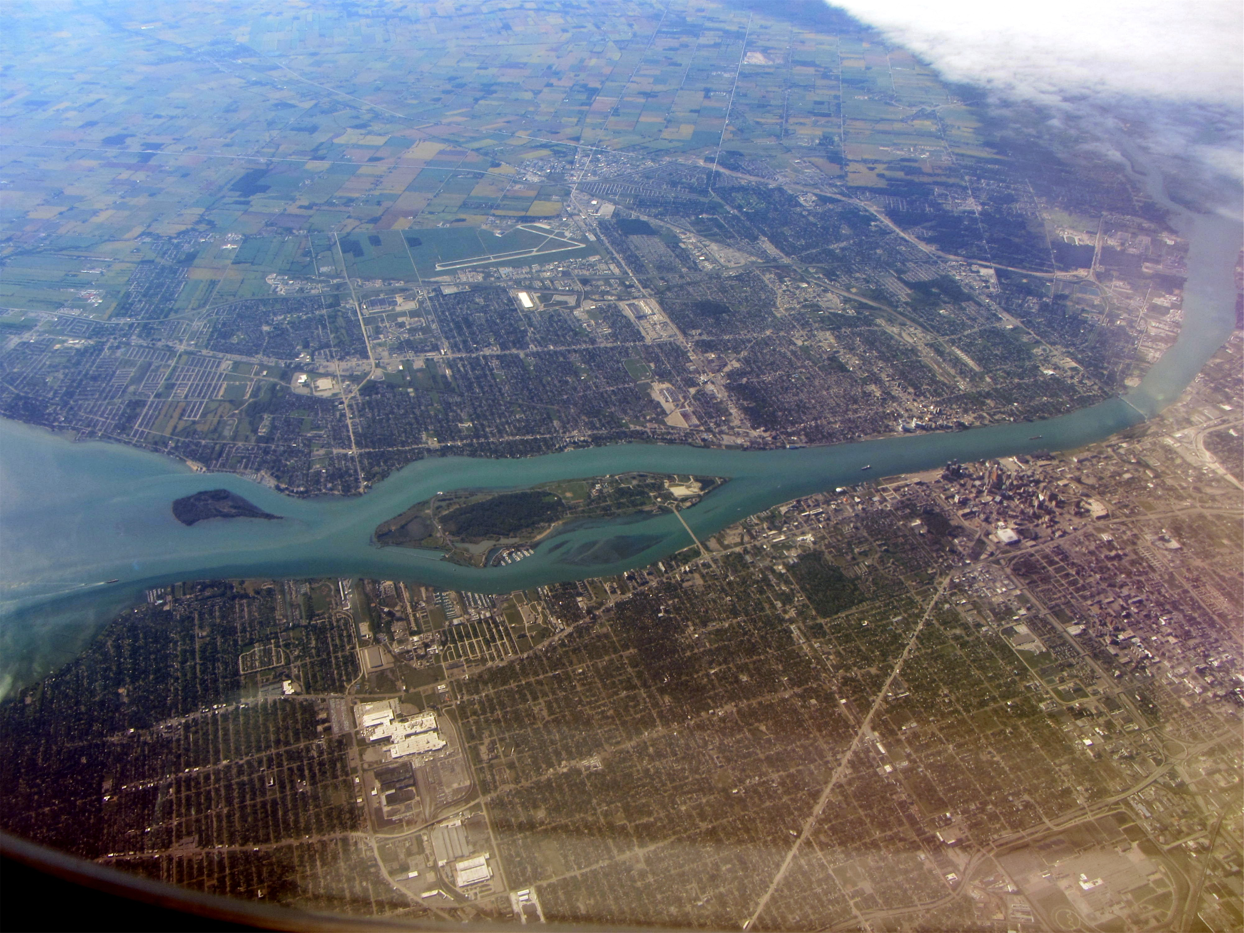 20120909 012 Detroit, Michigan